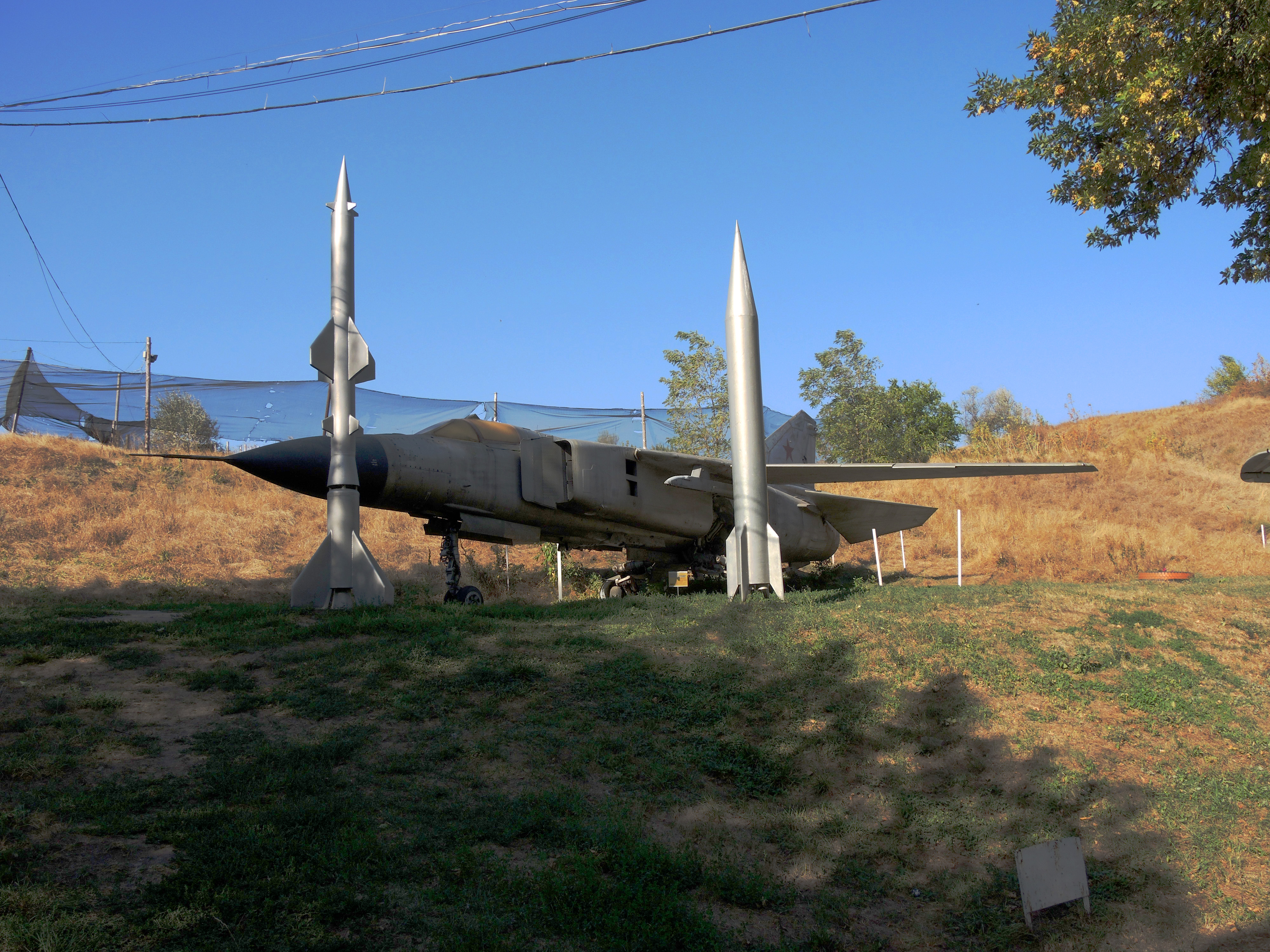 Балка Малый лог (балка Рябинина, Мухина балка): северная и западная стороны города, Аксай, Аксайский район, Ростовская область